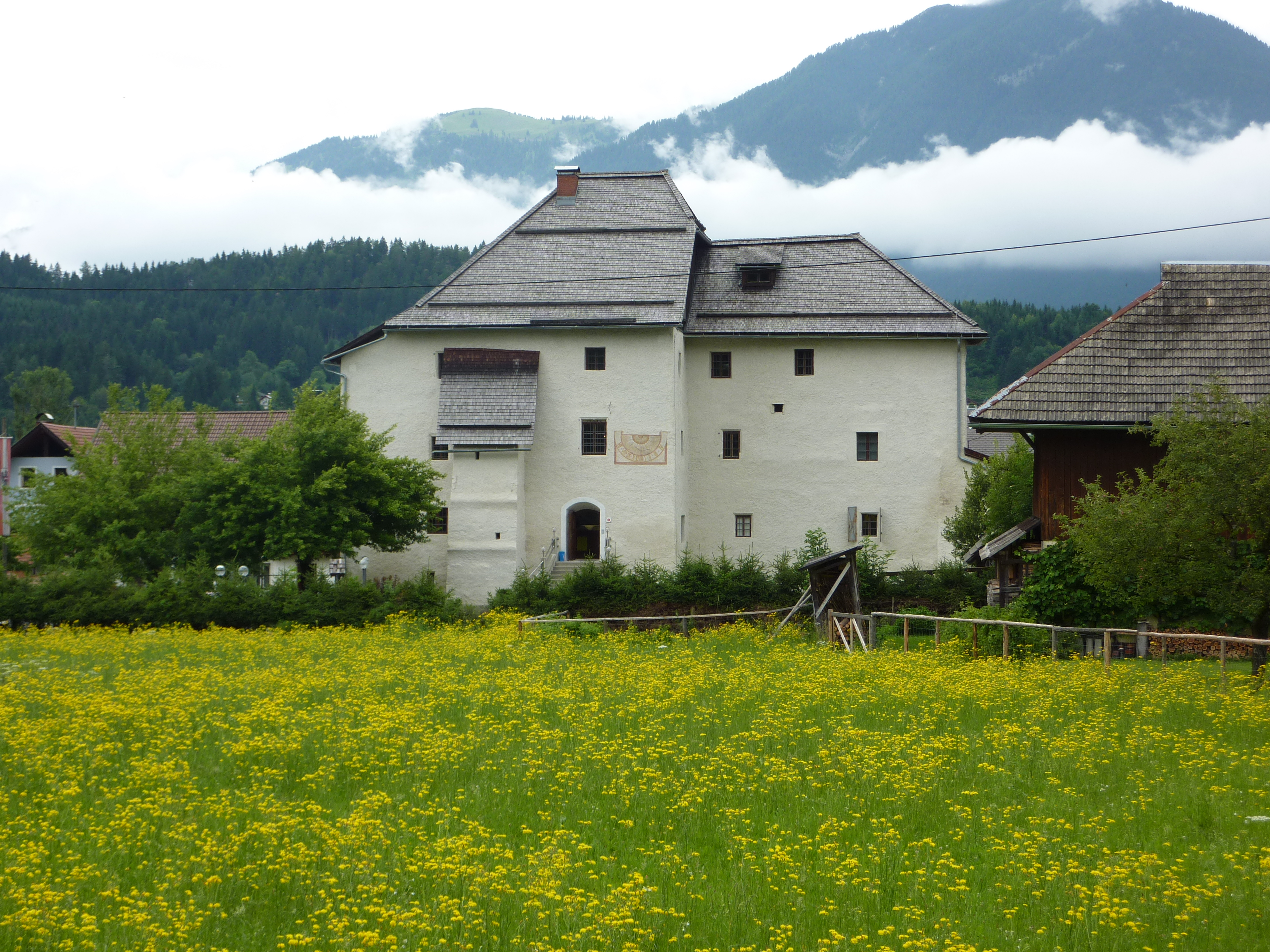 Schloss Möderndorf, Hermagor, Kärnten, Österreich